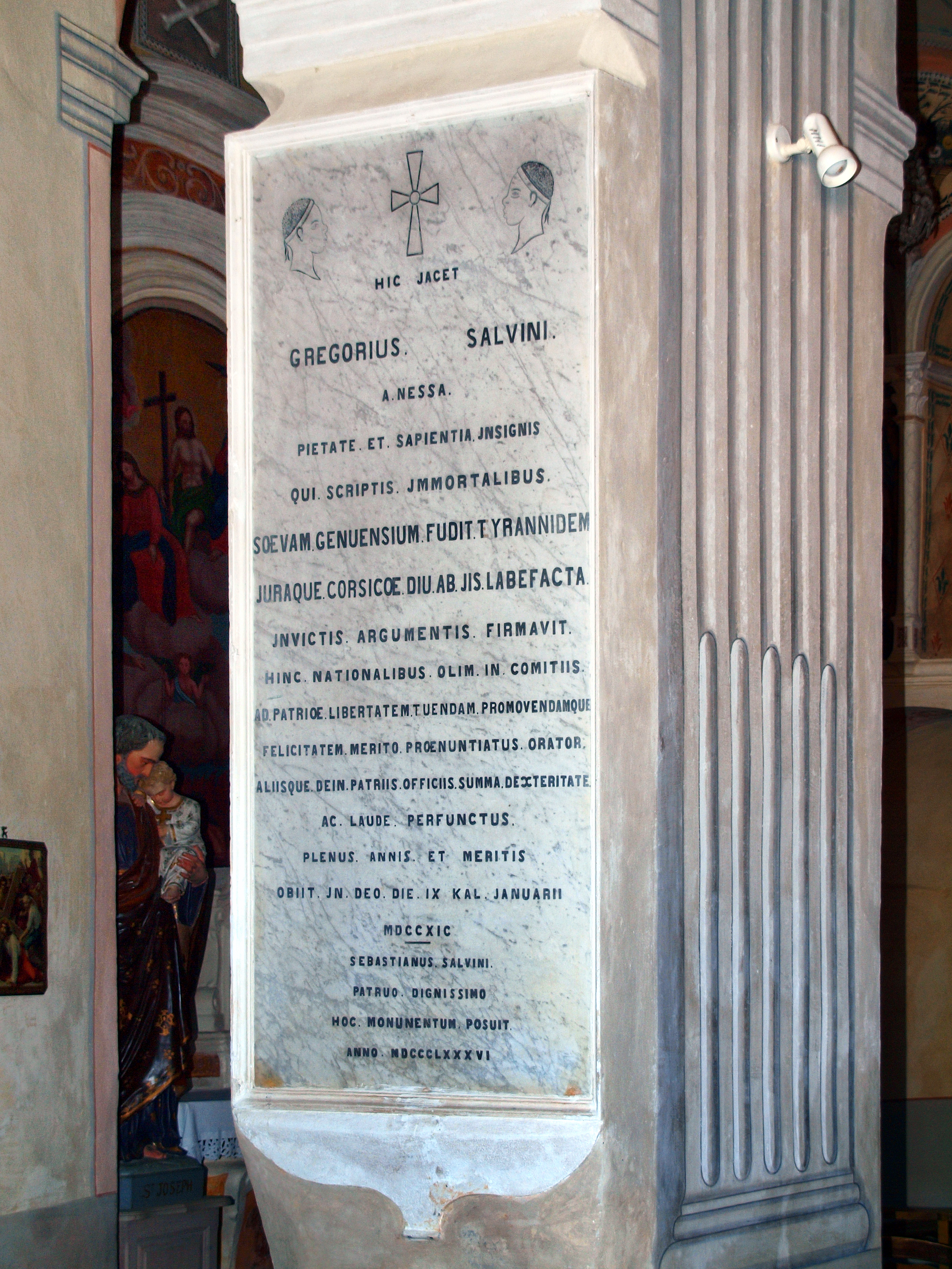 Nessa, Balagne (Corse) - Plaque commémorative Gregorius Salvini (Don-Gregorio Salvini) dans l'église paroissiale Saint-Joseph